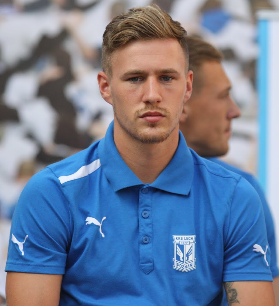 Barry Douglas na prezentacji Lecha Poznań.